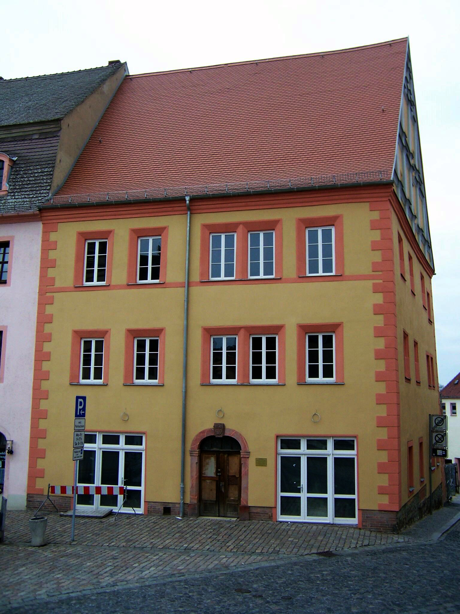 Beschreibung: Ehemaliges Kanzleihaus (Markt 21) in Colditz, Sachsen. Inschrift der Informationstafel am Haus: Hier lebte und arbeitete ab 1602 der Rechtsgelehrte Prof. Dr. Benedict Carpzov (geb. 22. 10. 1565 in Brandenburg, gest. 26. 11. 1624 in Wittenberg) als Kanzler der Kurfürstin Sophie von Sachsen. Sein Sohn August Carpzov (geb. 04. 06. 1612 in Colditz, gest. 19. 11. 1683 in Coburg) vertrat beim Westfälischen Friedensschluss 1648 Sachsen-Altenburg. Beide, Vater und Sohn, sind Vorfahren des heutigen niederländischen Königshauses. Quelle: eigene Aufnahme vom 8. April 2007